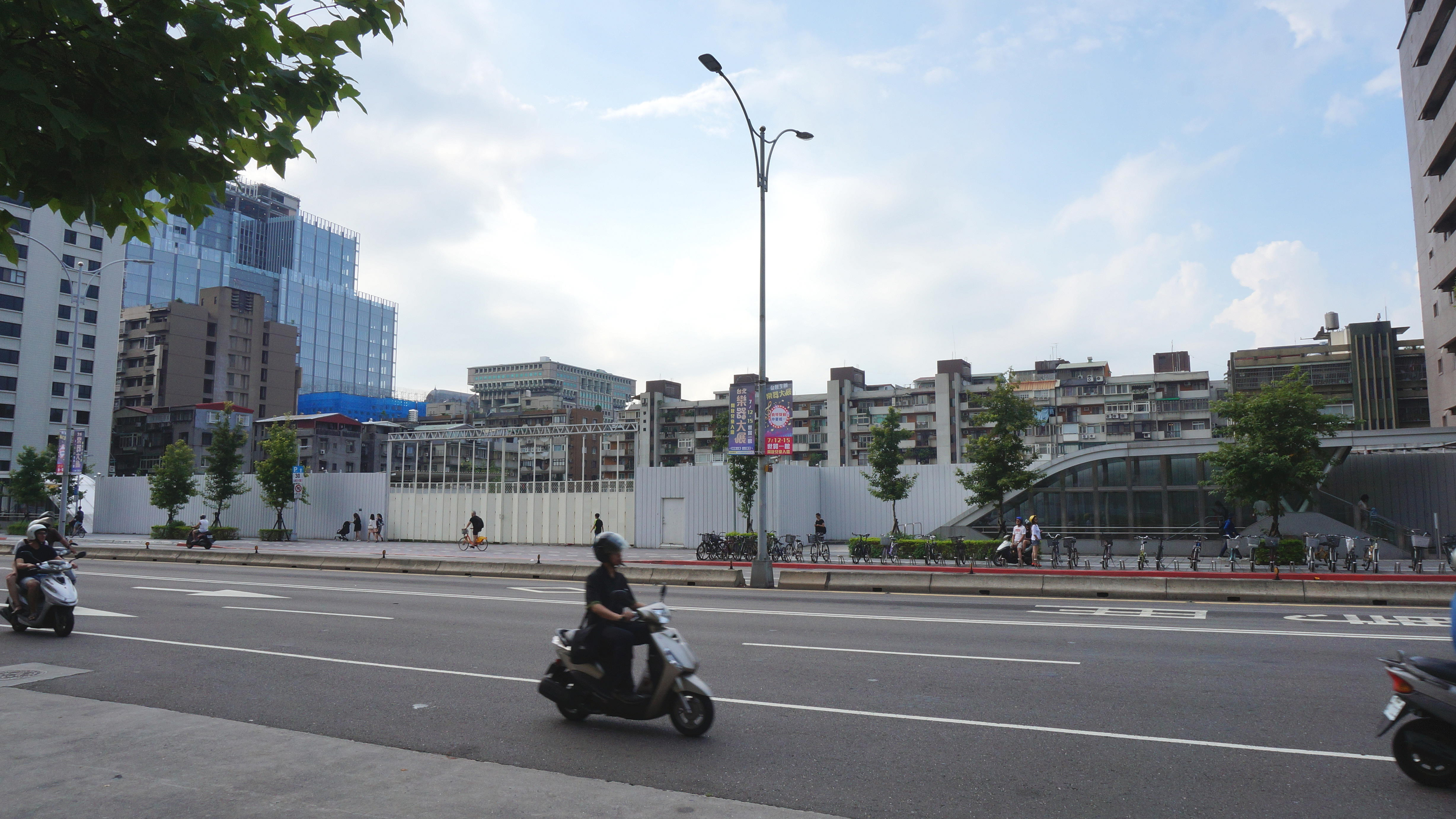 中華體育館舊址，中華體育館重建工程地基完成後停工至今，地址：臺北市松山區南京東路四段53號。